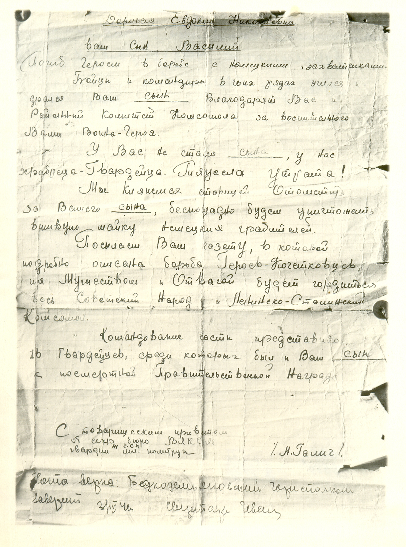 Письмо, присланное из воинской части, где служил В.Д. Кочетков, погибший в 1942 году во время Сталинградской битвы.